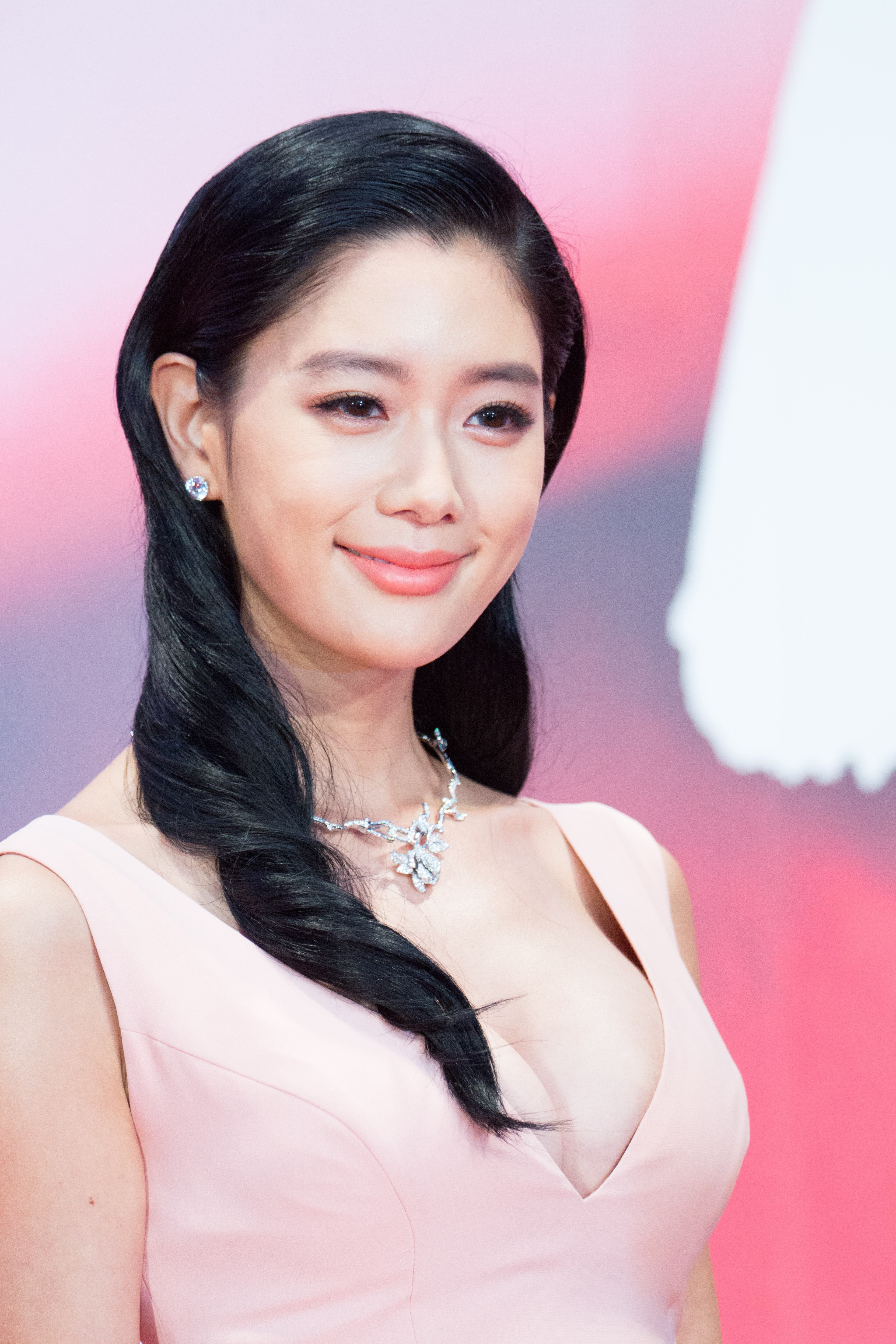 第30回 東京国際映画祭 オープニングセレモニー クララ (2017東京/沖縄・中国映画週間)